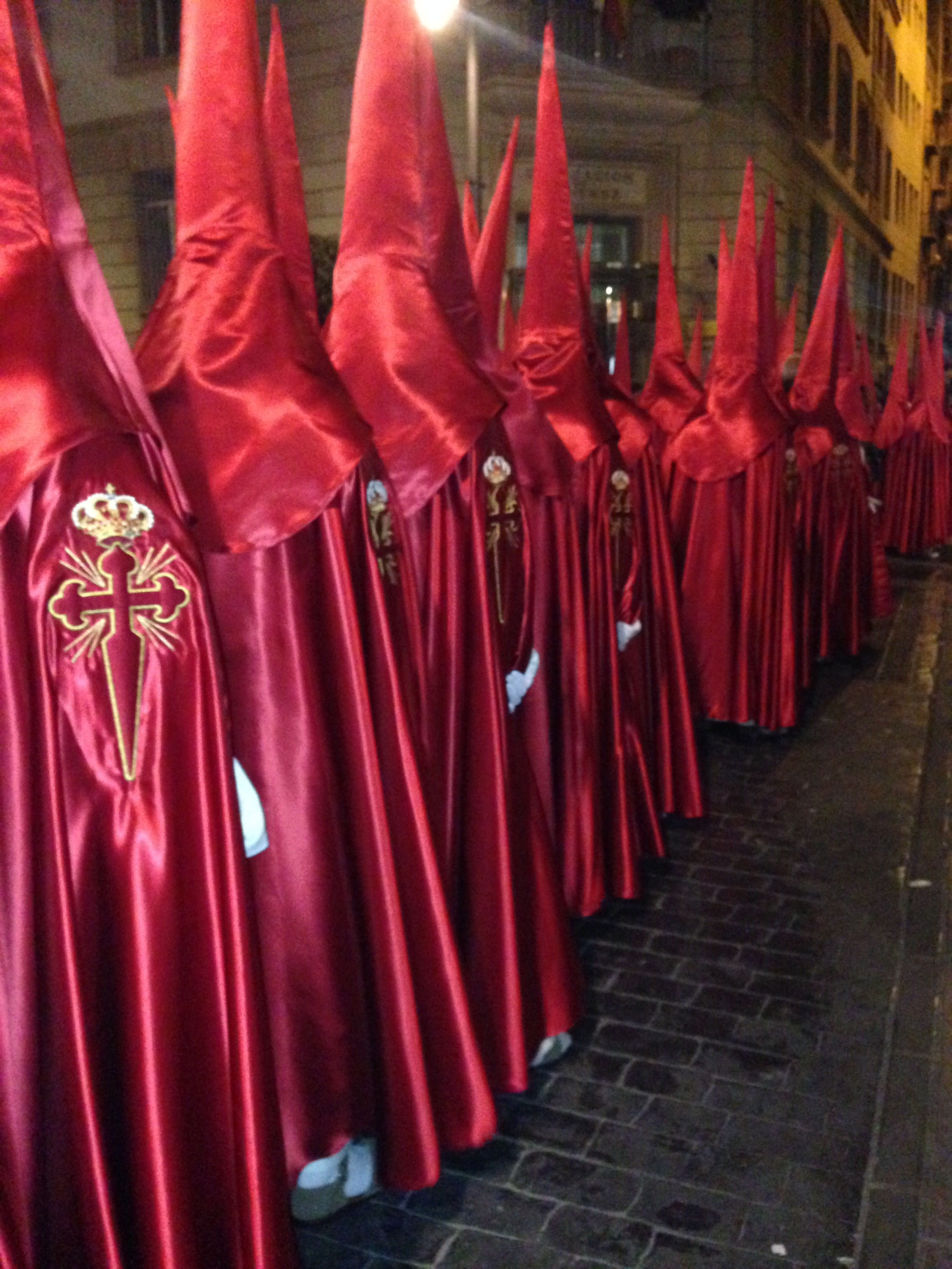 Penitentes del Santiago preparados para salir en procesión el Miércoles Santo en Cartagena, España.